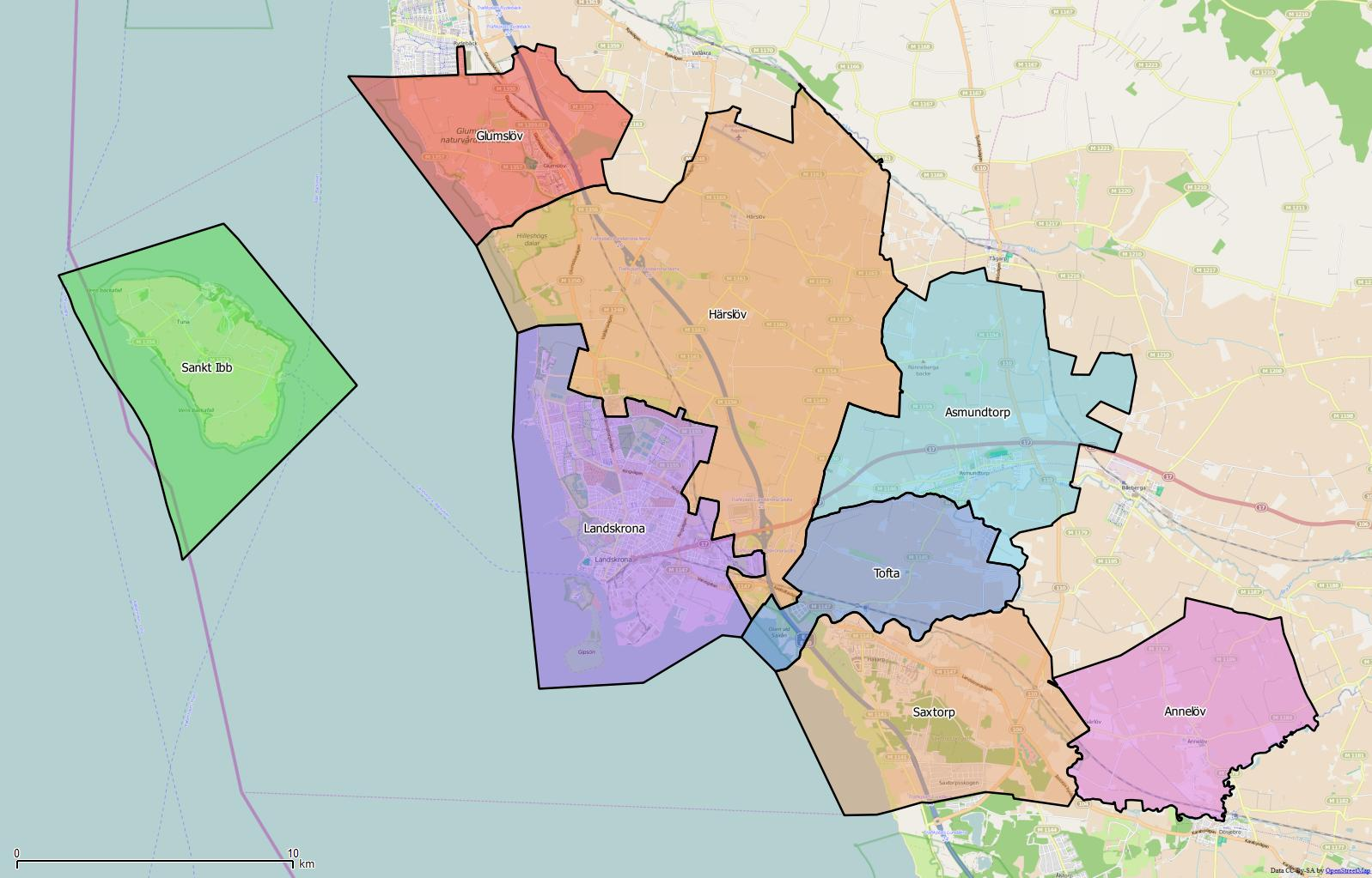 Distriktsindelningen i Kristinehamns kommun World file: 31.13811113773858708 0 0 -31.13811113773858708 1405971.77079663355834782 7552814.29861807264387608